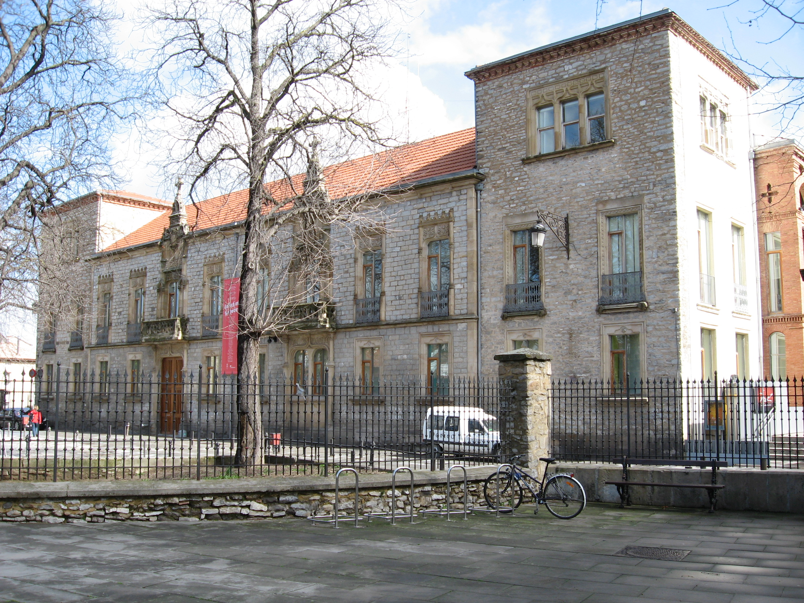 Desc: Palacio de Montehermoso